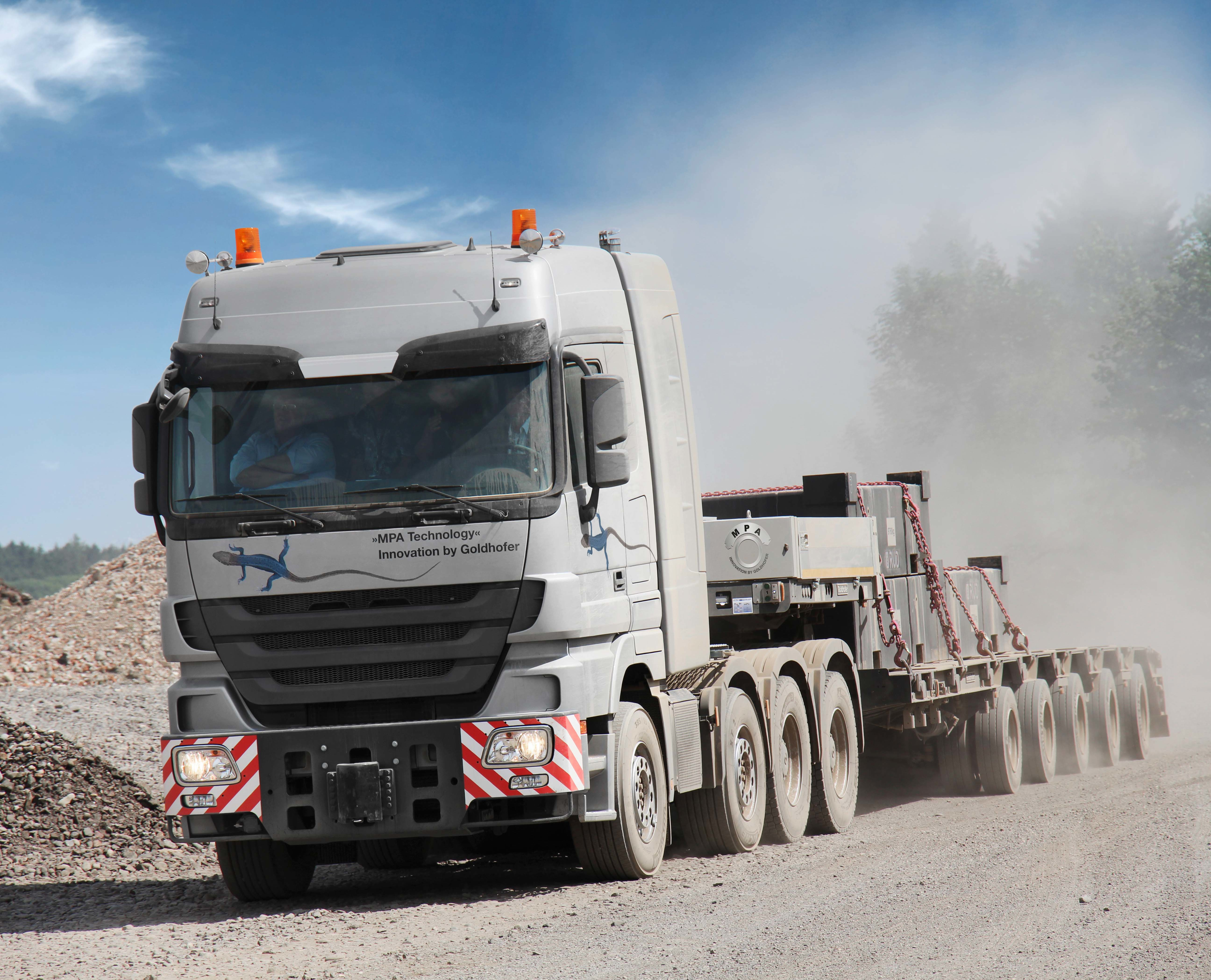 Der »MPA« im Einsatz (2014)